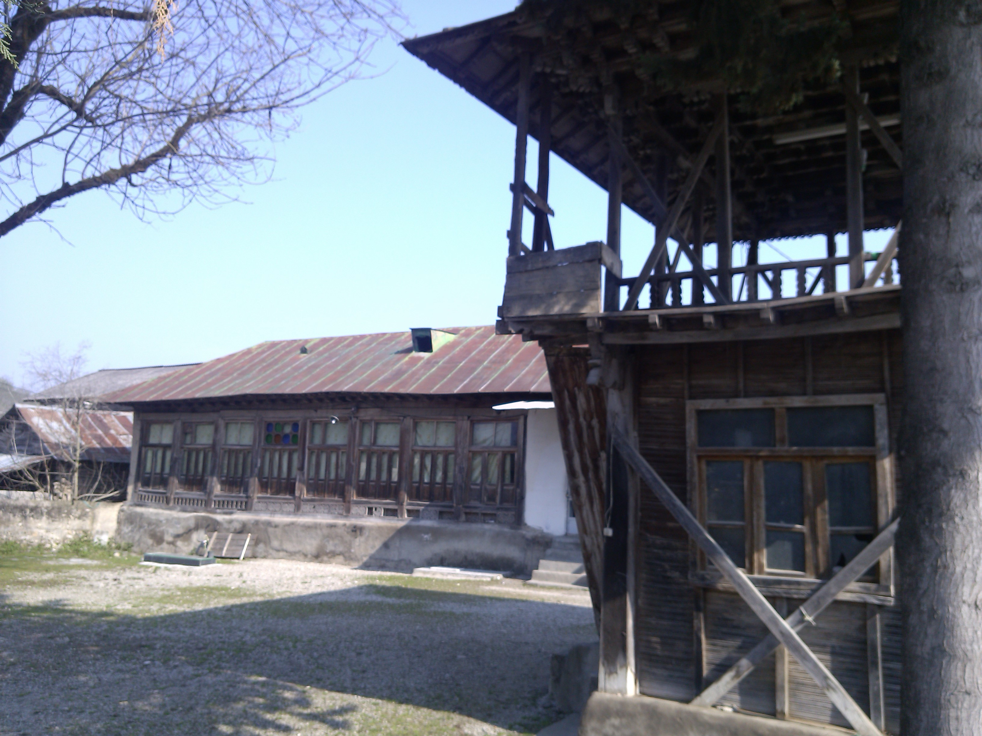 سقانفار شیاده بابل، مازندران، ایران